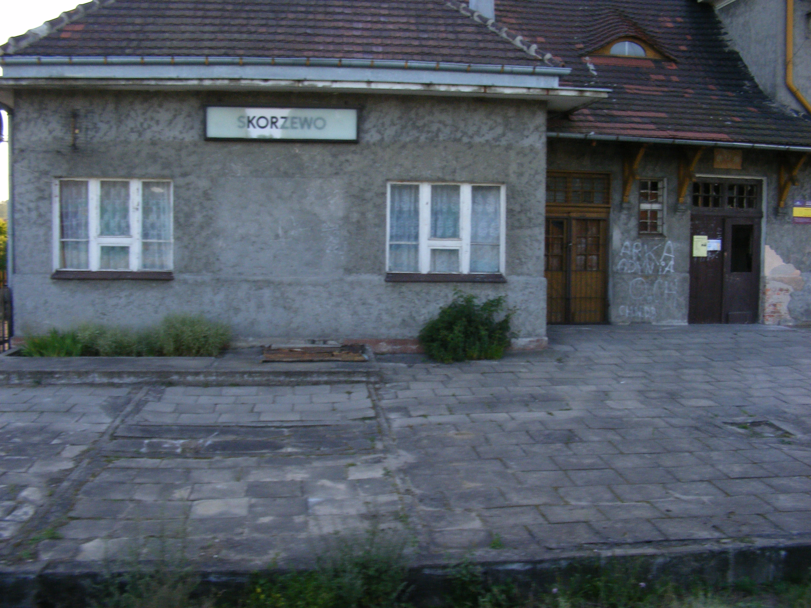 Przystanek kolejowy Skorzewo (woj. pomorskie)